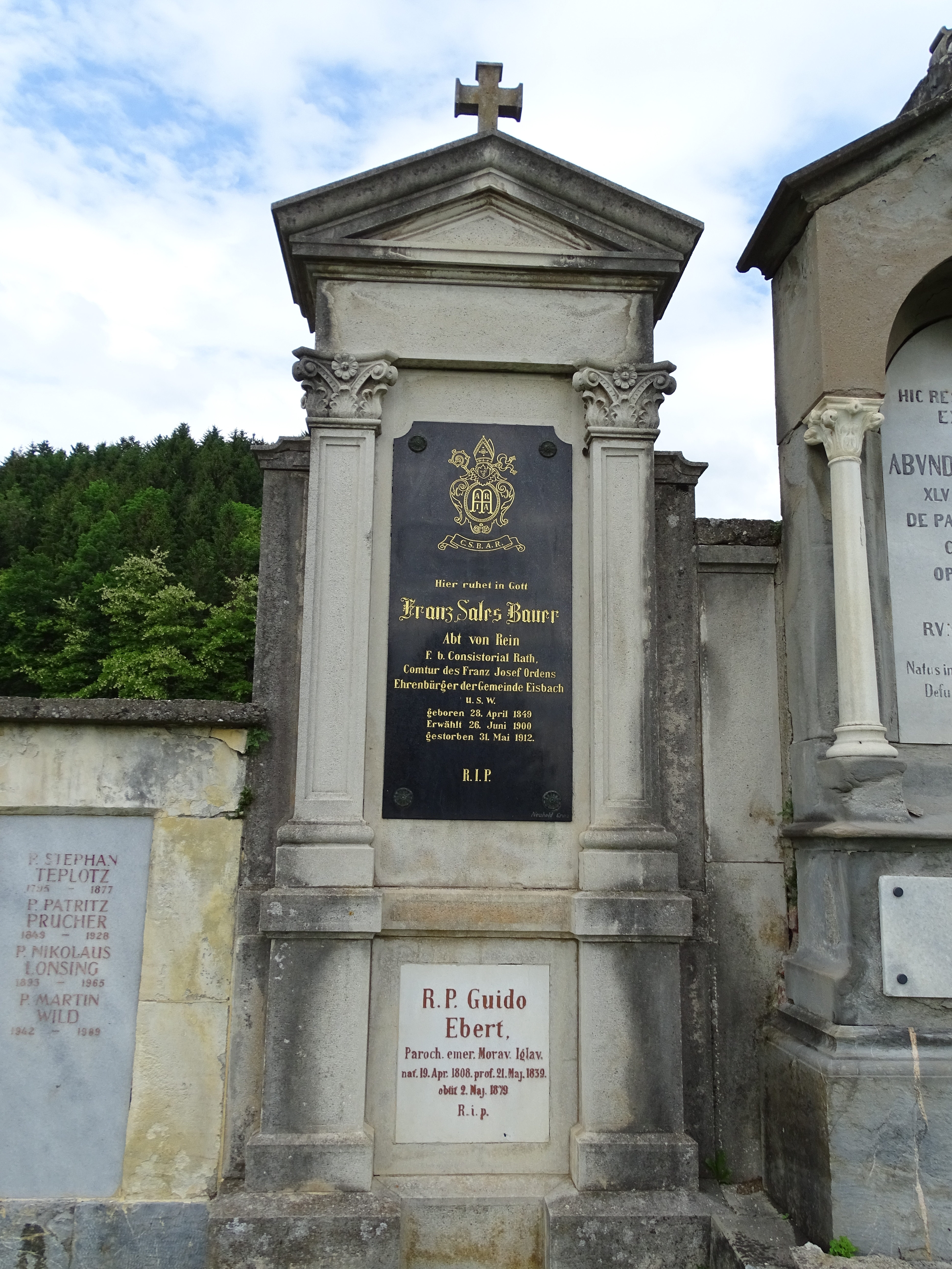 Die Abt- und Patresgräber am Friedhof Stift Rein-Eisbach